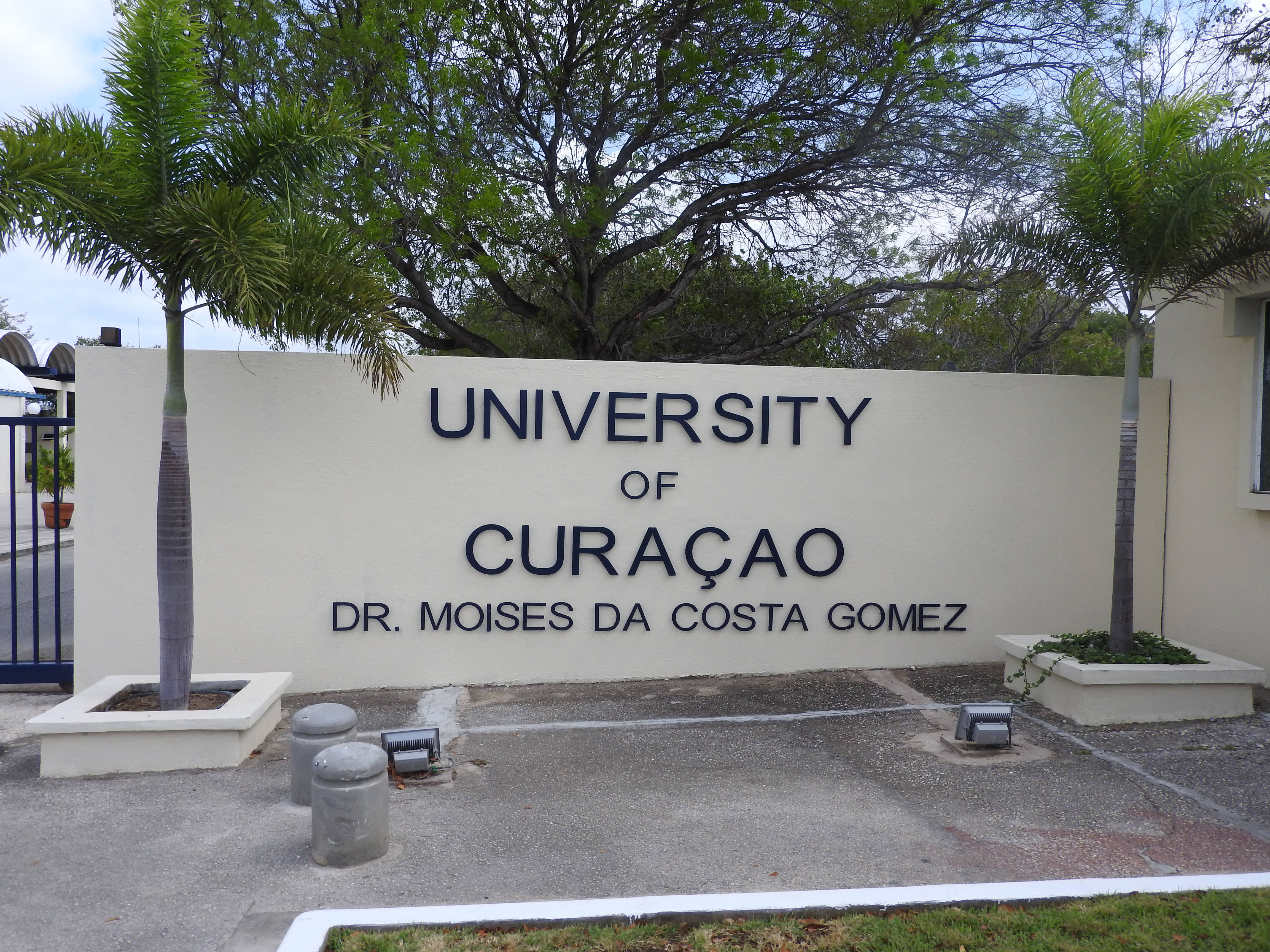 Portal picture for the University of Curaçao.